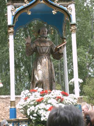 Imatge de San Pedro Regalado, festes de La Aguilera (Burgos). Talla del s. XVIII o XIX